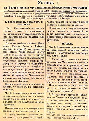 Устав на МФО.